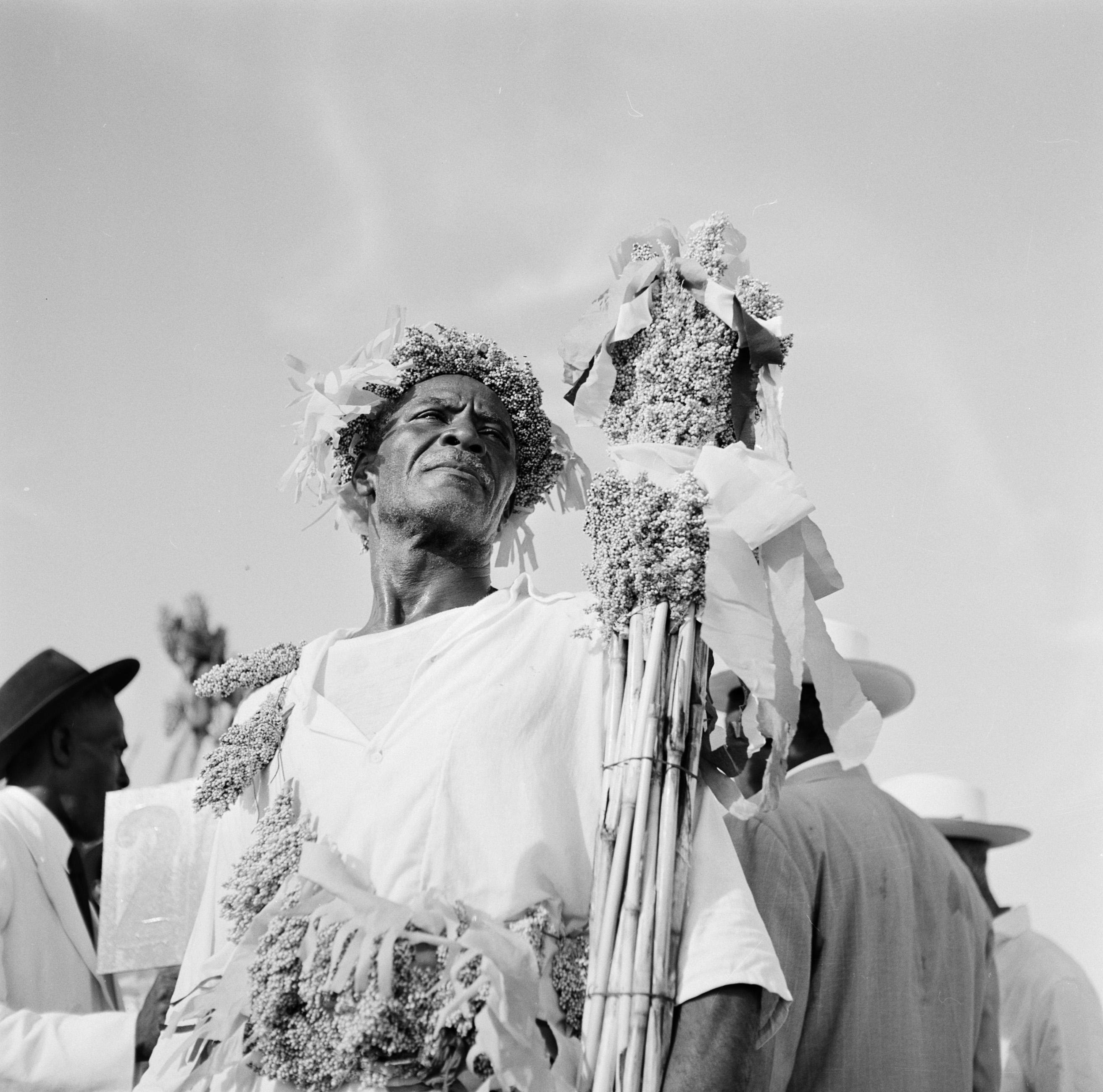 Collectie / Archief : Fotocollectie Van de Poll Reportage / Serie : Nederlandse Antillen en Suriname ten tijde van het koninklijk bezoek van koningin Juliana en prins Bernhard in 1955 Beschrijving : Kunuku-man in Barber Datum : 21 oktober 1955 Locatie : Barber, Curaçao, Nederlandse Antillen Trefwoorden : inheemse bevolking, portretten Fotograaf : Poll, Willem van de Auteursrechthebbende : Nationaal Archief Materiaalsoort : Negatief (zwart/wit) Nummer archiefinventaris : bekijk toegang 2.24.14.02 Bestanddeelnummer : 252-3719